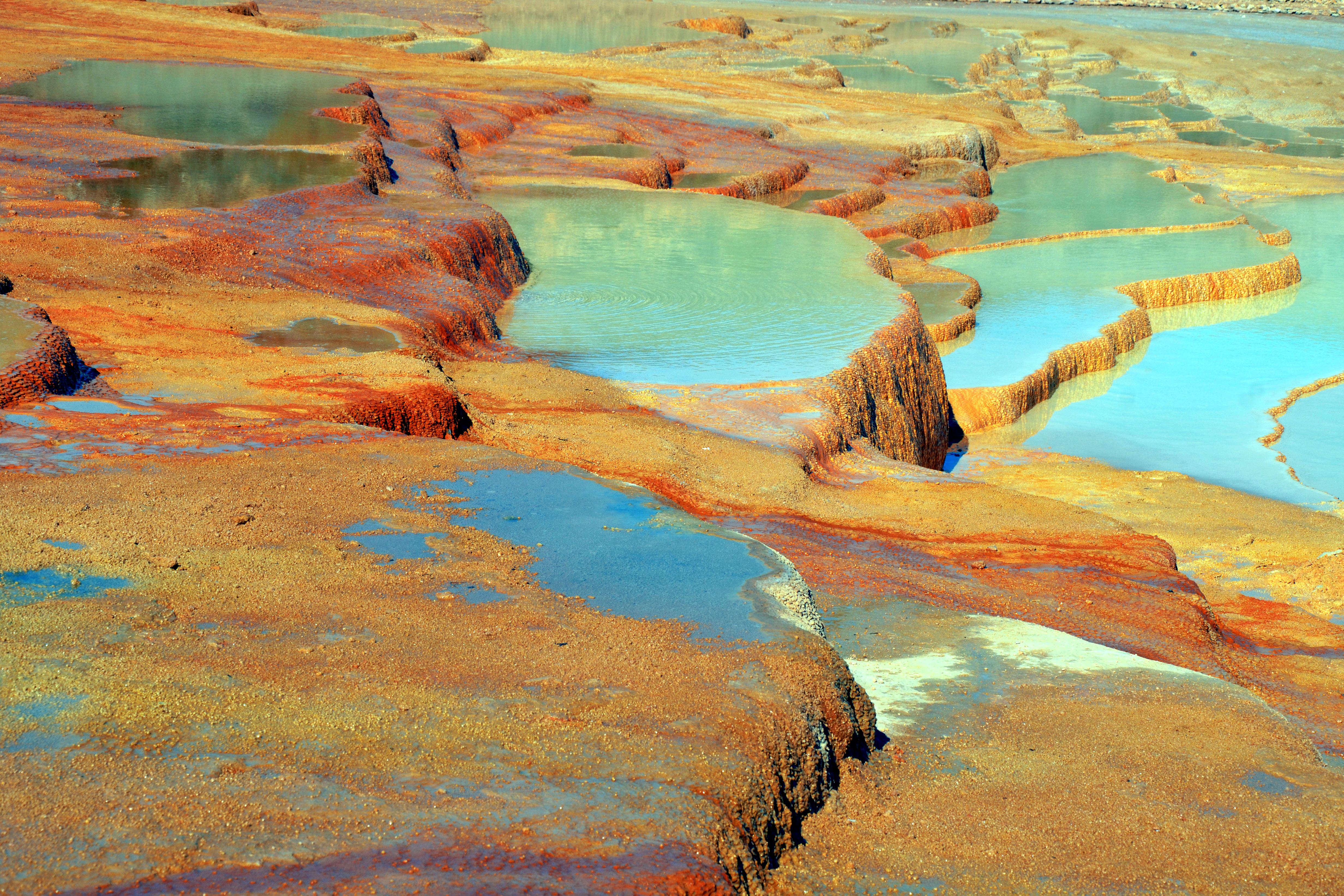 Badab Sort springs